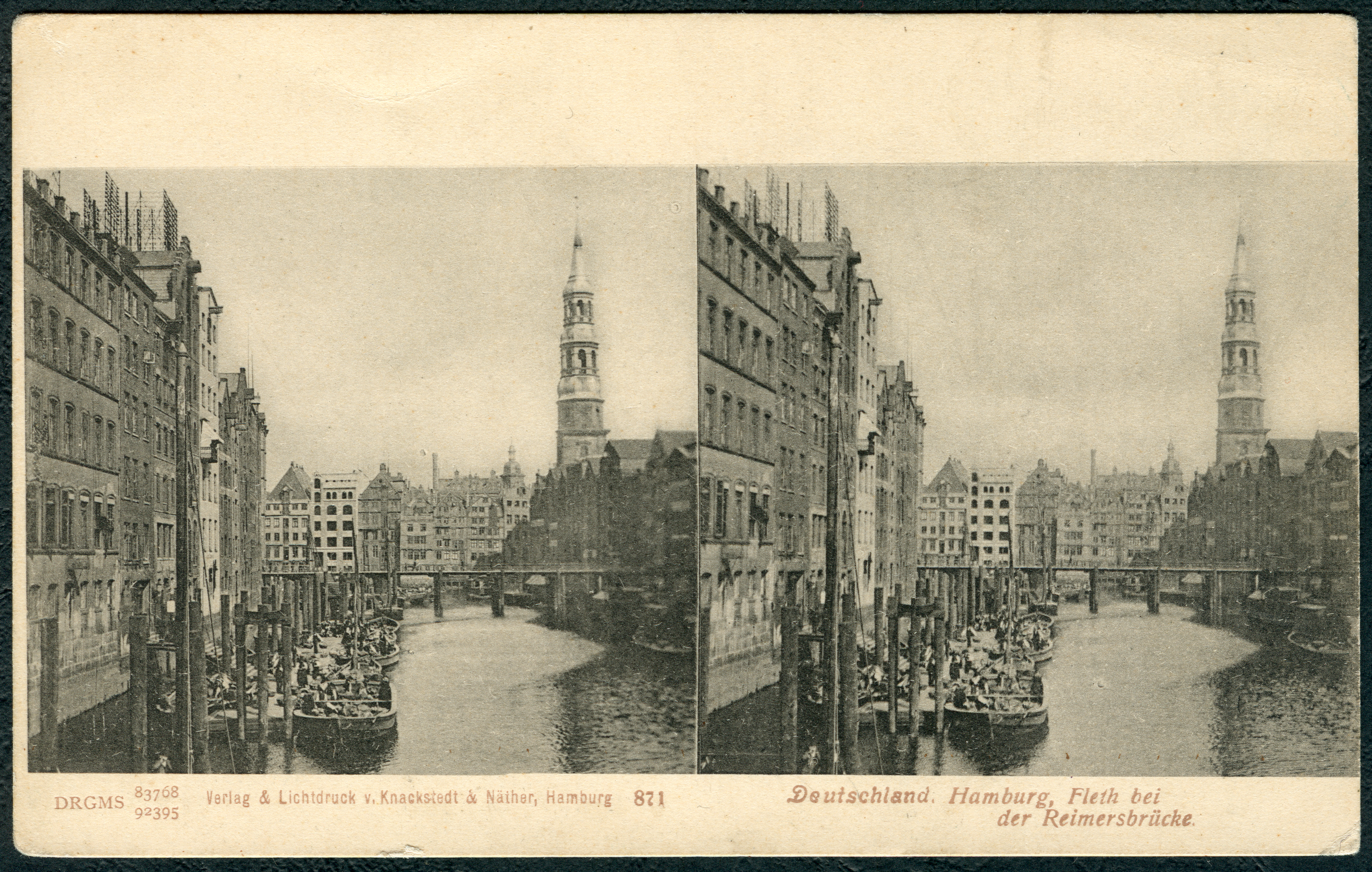 Stereoskopie der Firma Knackstedt & Näther mit der fortlaufenden Nummer 871, hier mit einem Blick durch den Nikolaifleet mit Schiffen und der Reimersbrücke auf die Hauptkirche Sankt Katharinen in Hamburg. Das auf Lichtdruck spezialisierte hamburger Unternehmen (auch: K & N) hatte für ihre stereographischen Ansichtskarten die DRGM-Nummern 83768 und 92395 eintragen lassen ... Diese Karte wurde dankenswerterweise von Ilse Paul zur Verfügung gestellt, um sie als Digitalisat über Wikimedia Commons nachhaltig allen Menschen zur Verfügung zu stellen ...